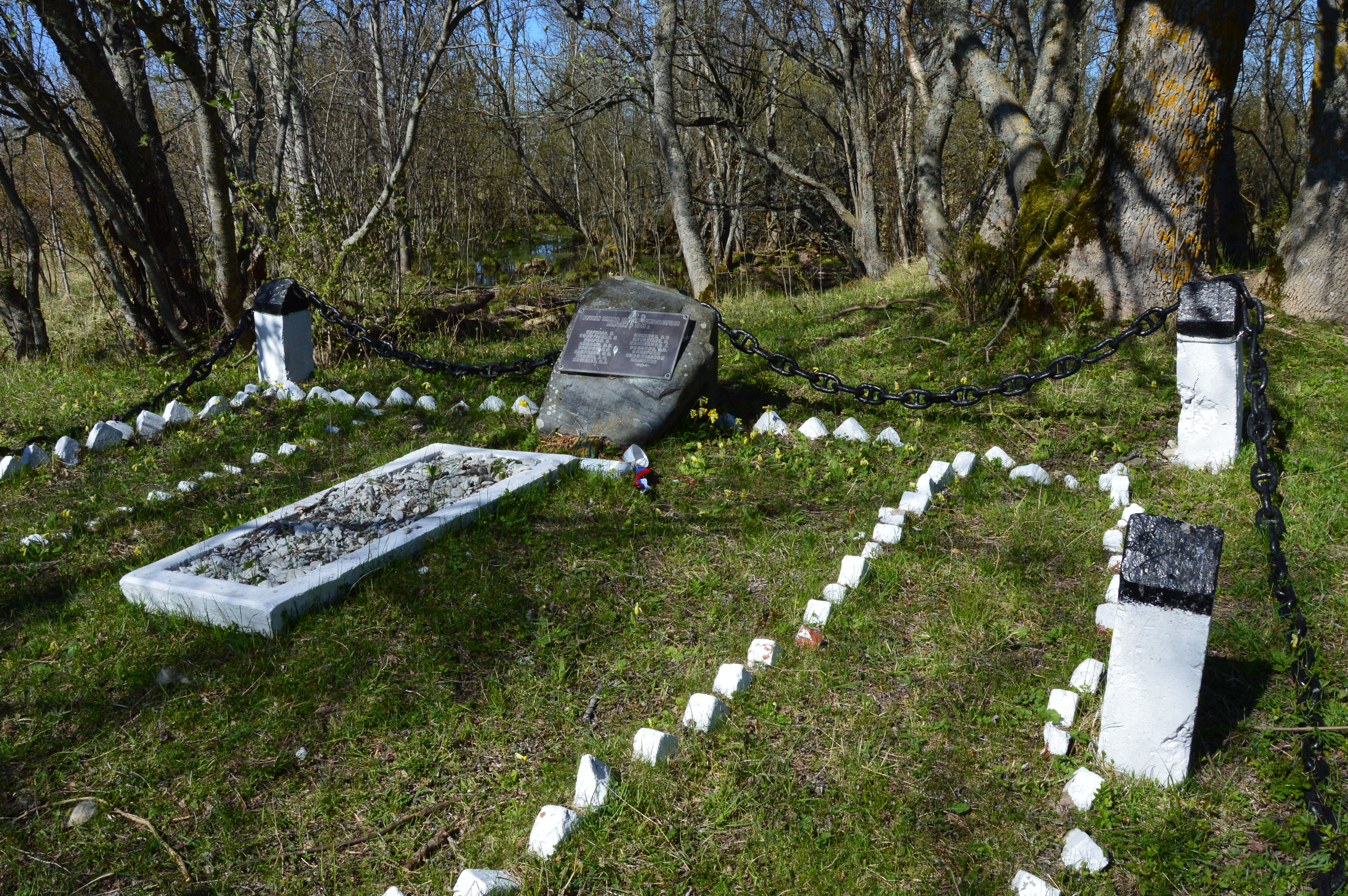 Sõdurite mälestusmärk Osmussaarel.